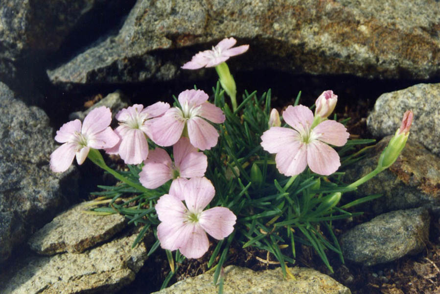 Dianthus microlepis subsp. musalae